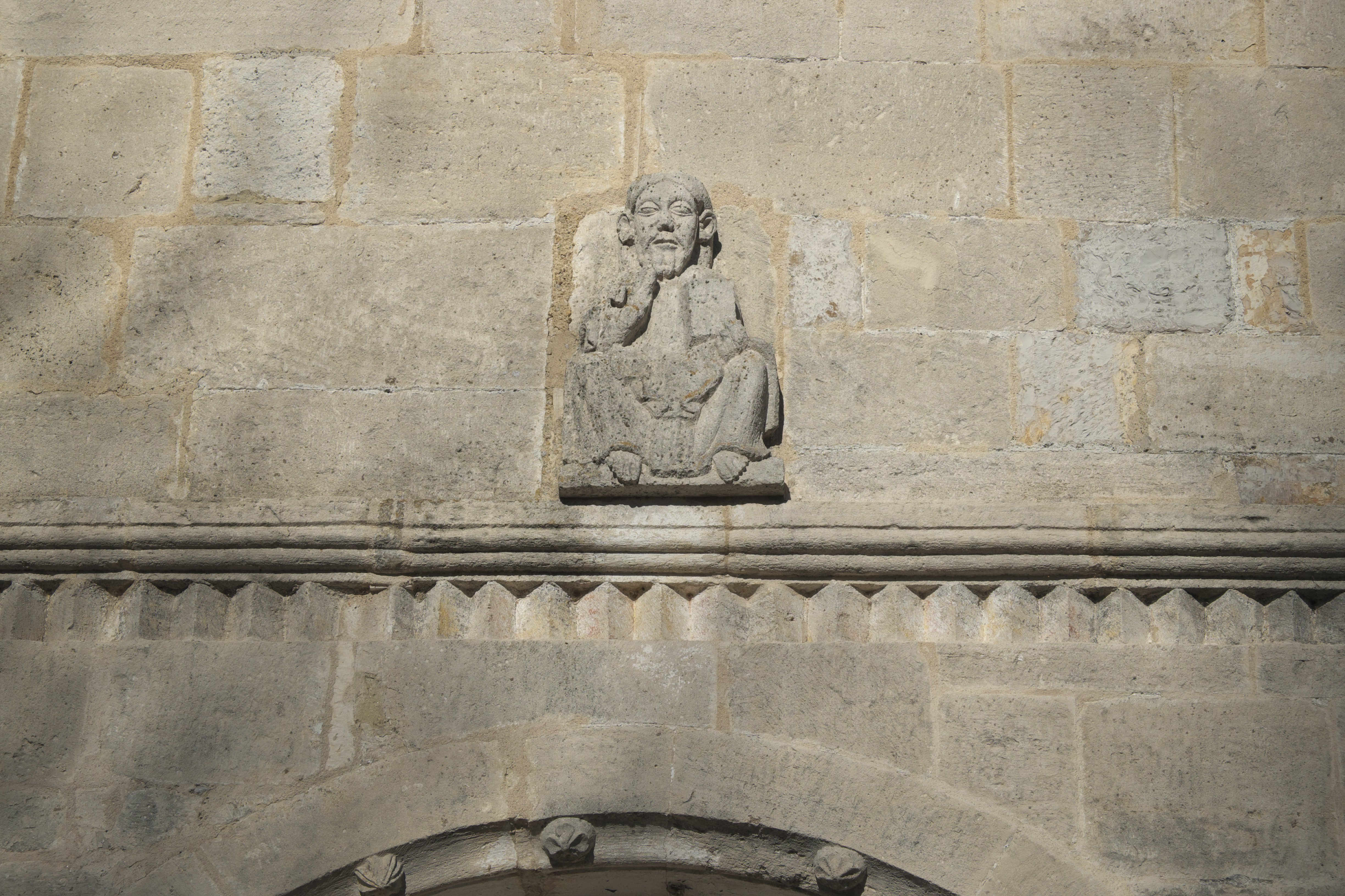 Katholische Pfarrkirche St. Ulrich in Ainau (Geisenfeld) im Landkreis Pfaffenhofen an der Ilm (Bayern/Deutschland), romanisches Relief am Portal